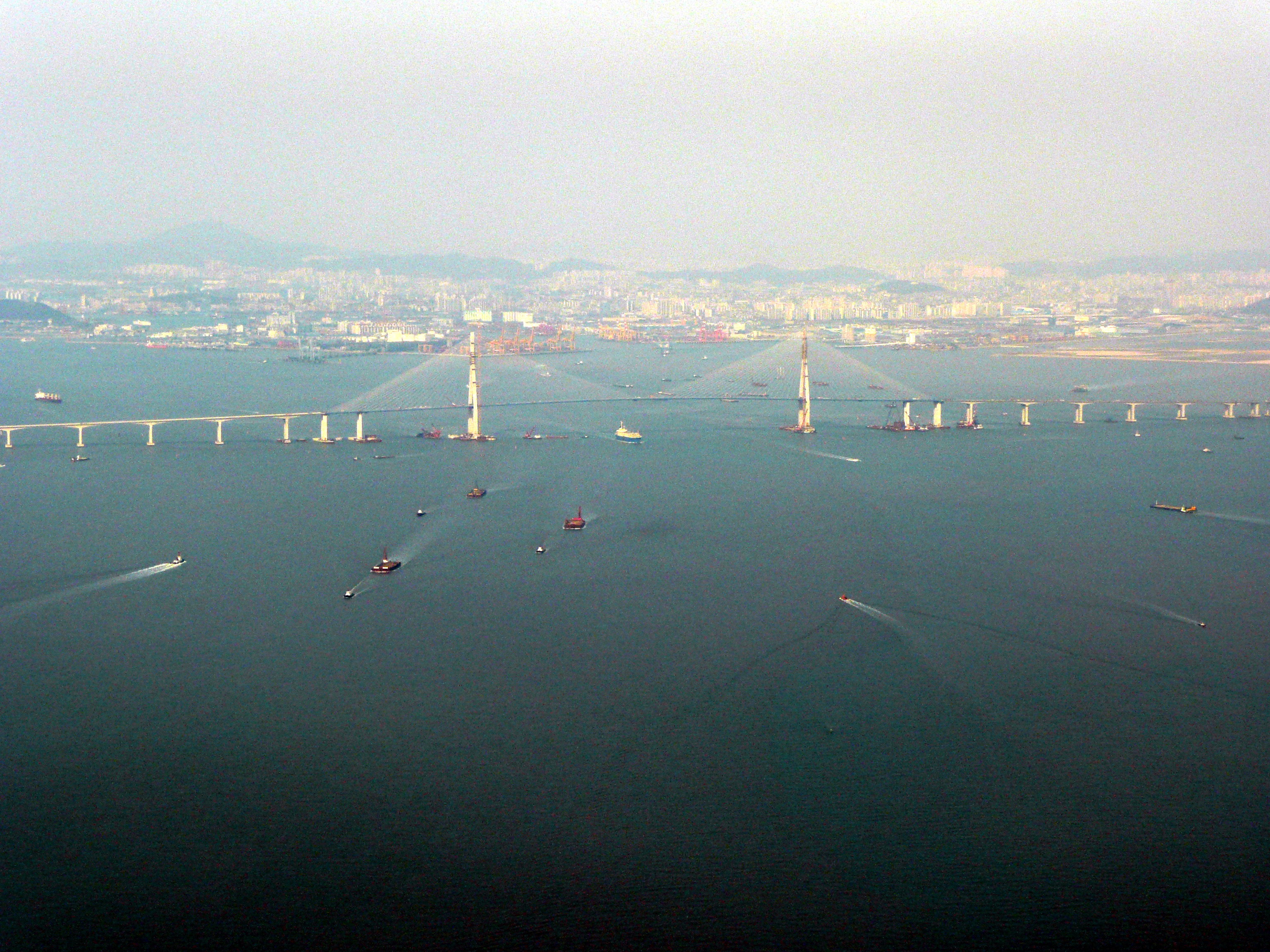 仁川大橋空撮（2009年3月29日撮影）